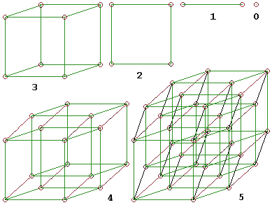 Parallelprojektionen der 0- bis 5-dimensionalen Würfelanaloga